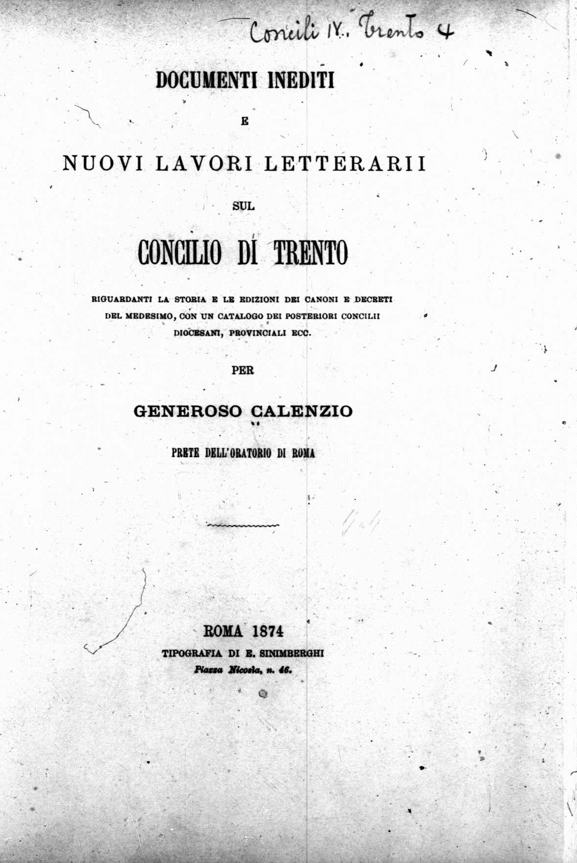 Frontespizio